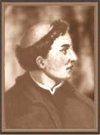 Fray Melchor de Talamantes